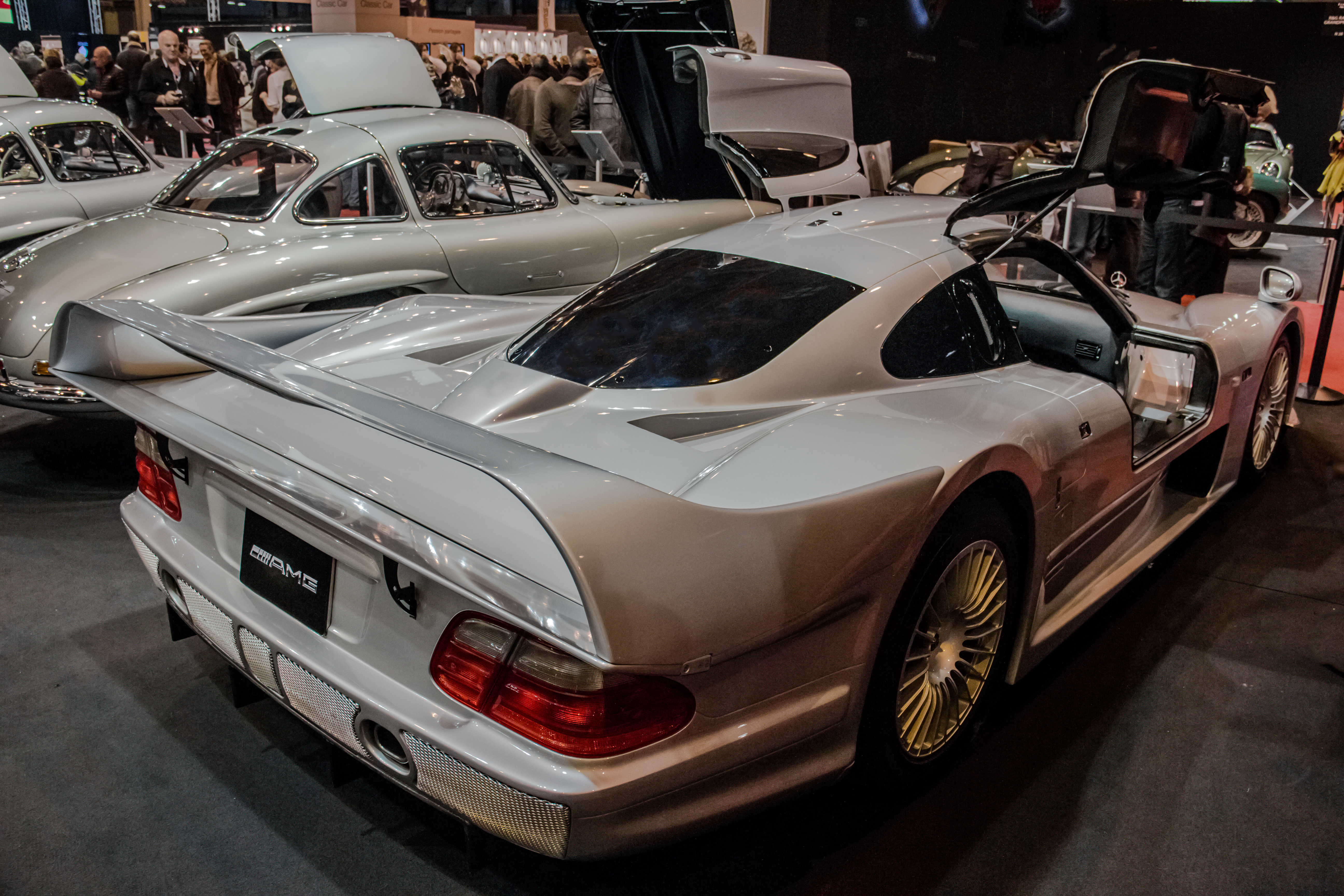 open door